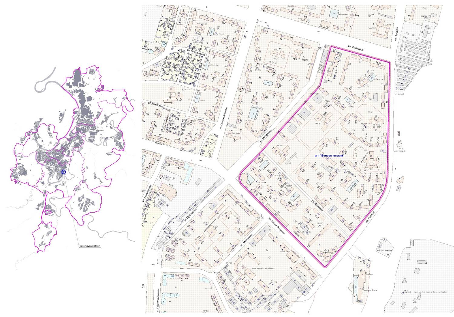 На изображении, опубликованном на сайте Главархитектуры Администрации городского округа город Уфа Республики Башкортостан, показана официальная схема размежевания микрорайона "Белореченский"